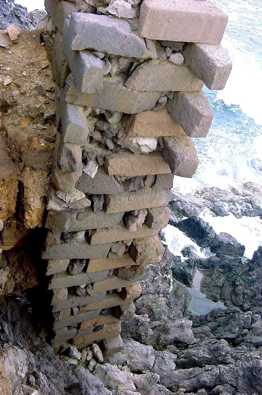 Muralhas do Forte do Bom Jesus, Estado em que se encontravam em Maio de 2006,Vila de São Sebastião, ilha Terceira, Açores